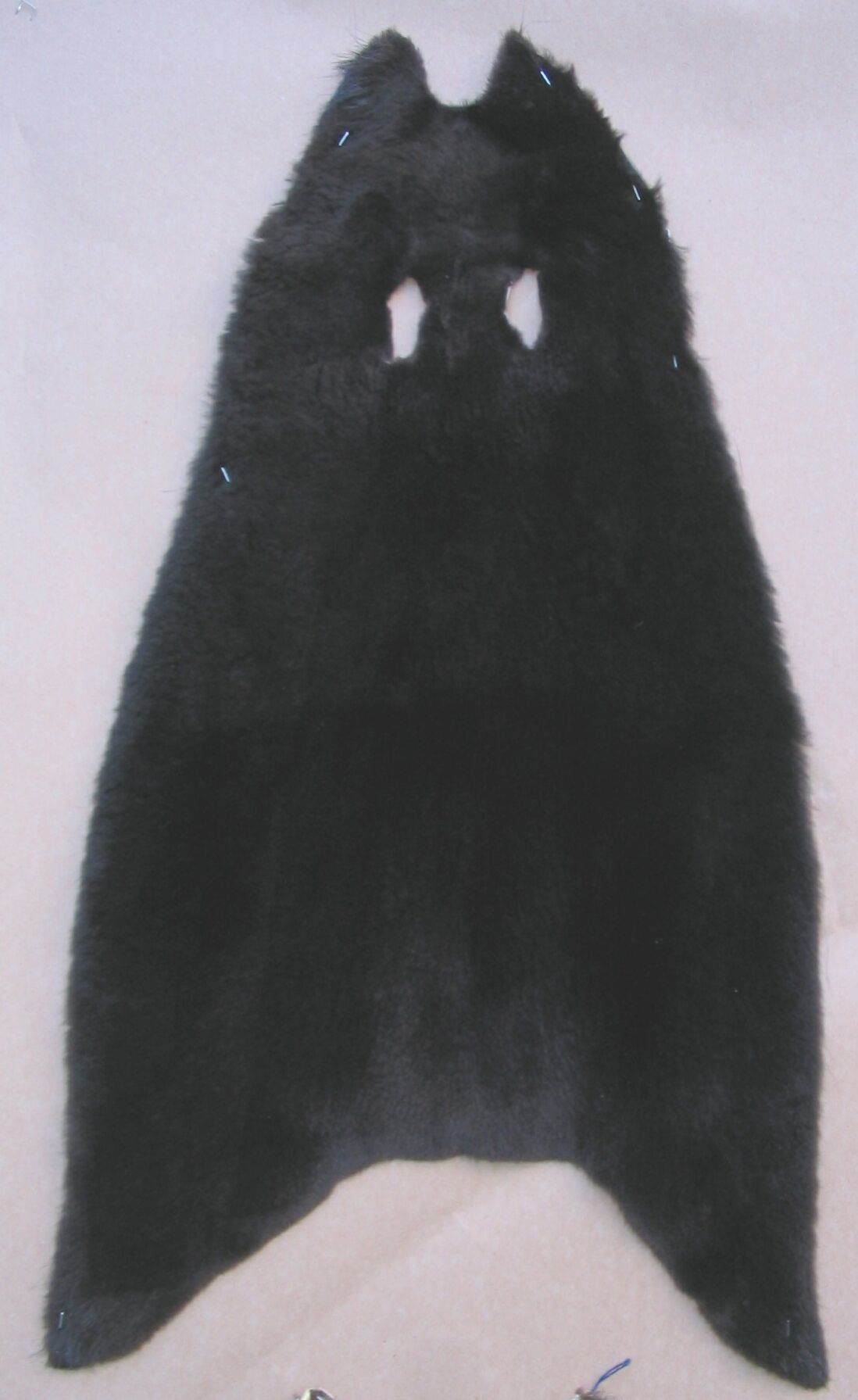 Nutria skin plugged and dyed / Nutriafell, gerupft und geschoren. 2003, Südamerika.